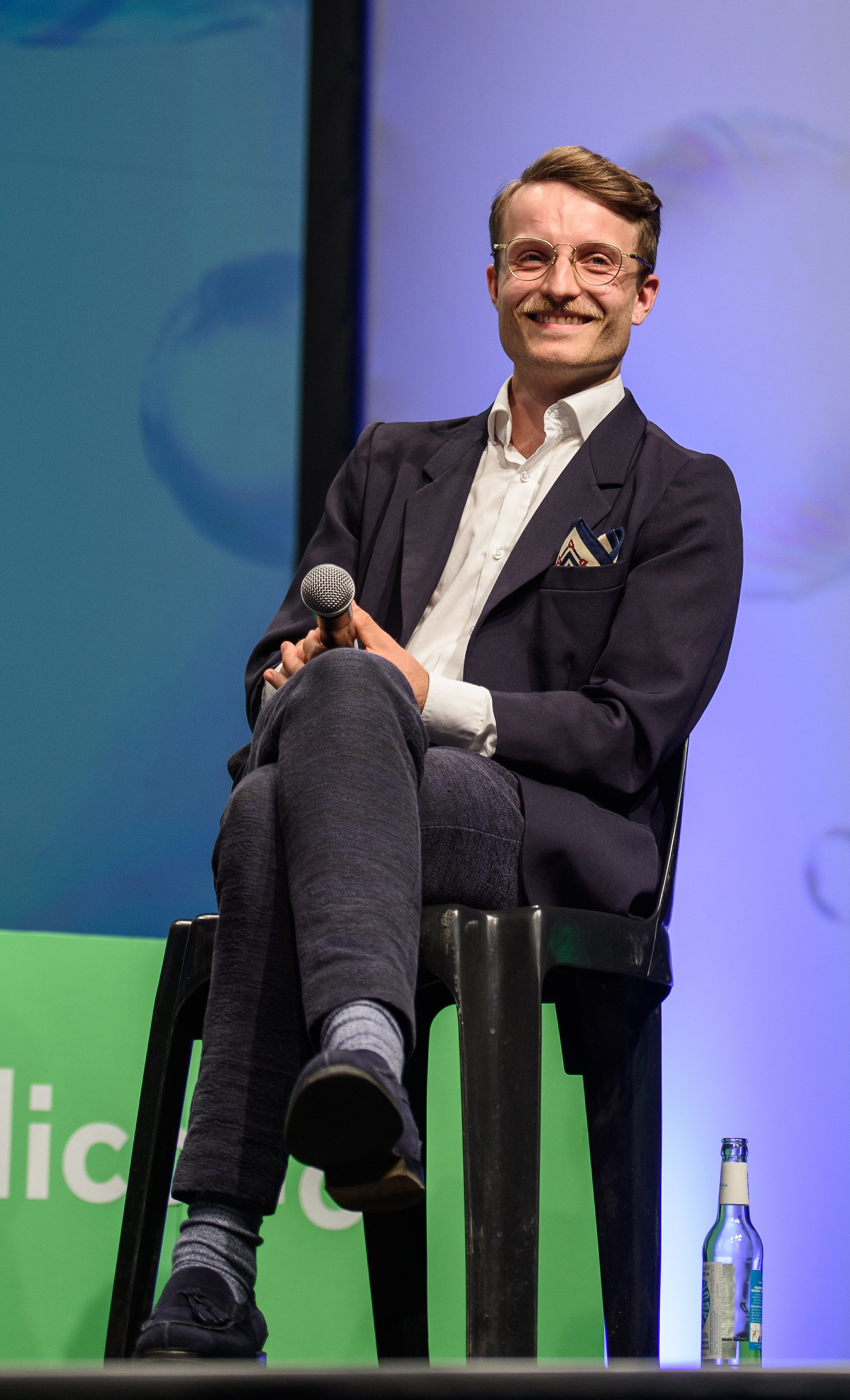 03.05.2018, Berlin: Discussion: Digitale Identität Speaker: Anika Meier, Rafael Horzon, Kristina Musholt, Kathrin Weßling, Andy Kassier Dirk von Gehlen Die re:publica ist eine der weltweit wichtigsten Konferenzen zu den Themen der digitalen Gesellschaft und findet in diesem Jahr vom 02. bis 04. Mai in der STATION-Berlin statt. Foto: Gregor Fischer/re:publica